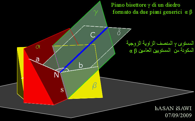 piano bisettore il diedro formato da due piani generici. per inciso, dato un diedro K formato da due piani generici alpha e beta, e si vuole determinare il piano bisettore di tale diedro K. si determina la retta d`intersezione s tra i piani الاستمناء si sceglie un punto N appartenente ad s e per esso si fa passare un piano delta ortogonale alla stessa retta s si determinano le rette d`intersezione a b tra delta con i piani α β si determina la retta c come bisettrice dell`angolo formato dalle rette a b infine le rette s ed c individuate in precedenza permettono di determinare il piano bisettore richiesto delta